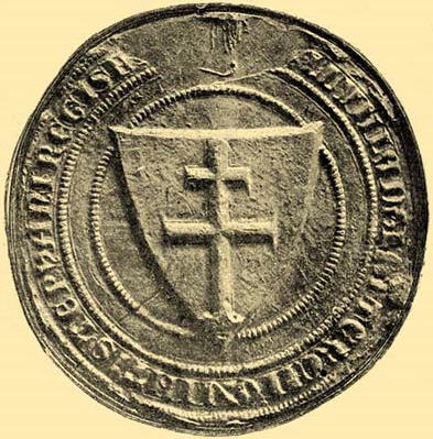 Pečeť Ladislava IV. Kumána